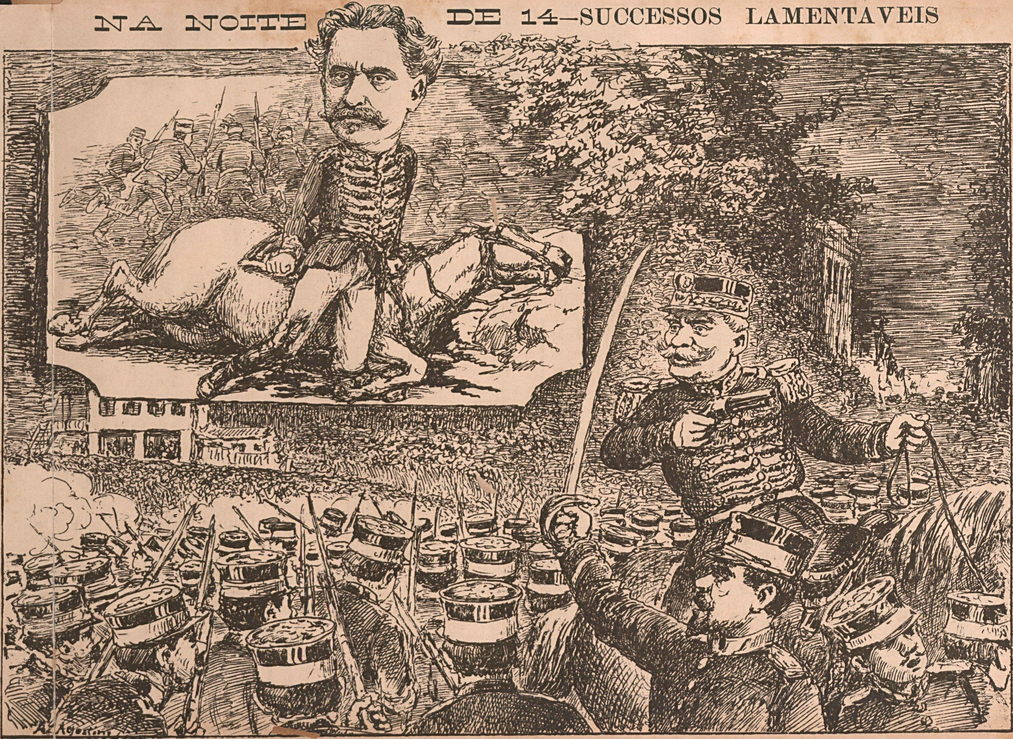 O general Travassos, commandante revolucionário da Escola Militar, ferido mortalmente, e o general Piragibe, commandante da Brigada Policial, cumprindo ...